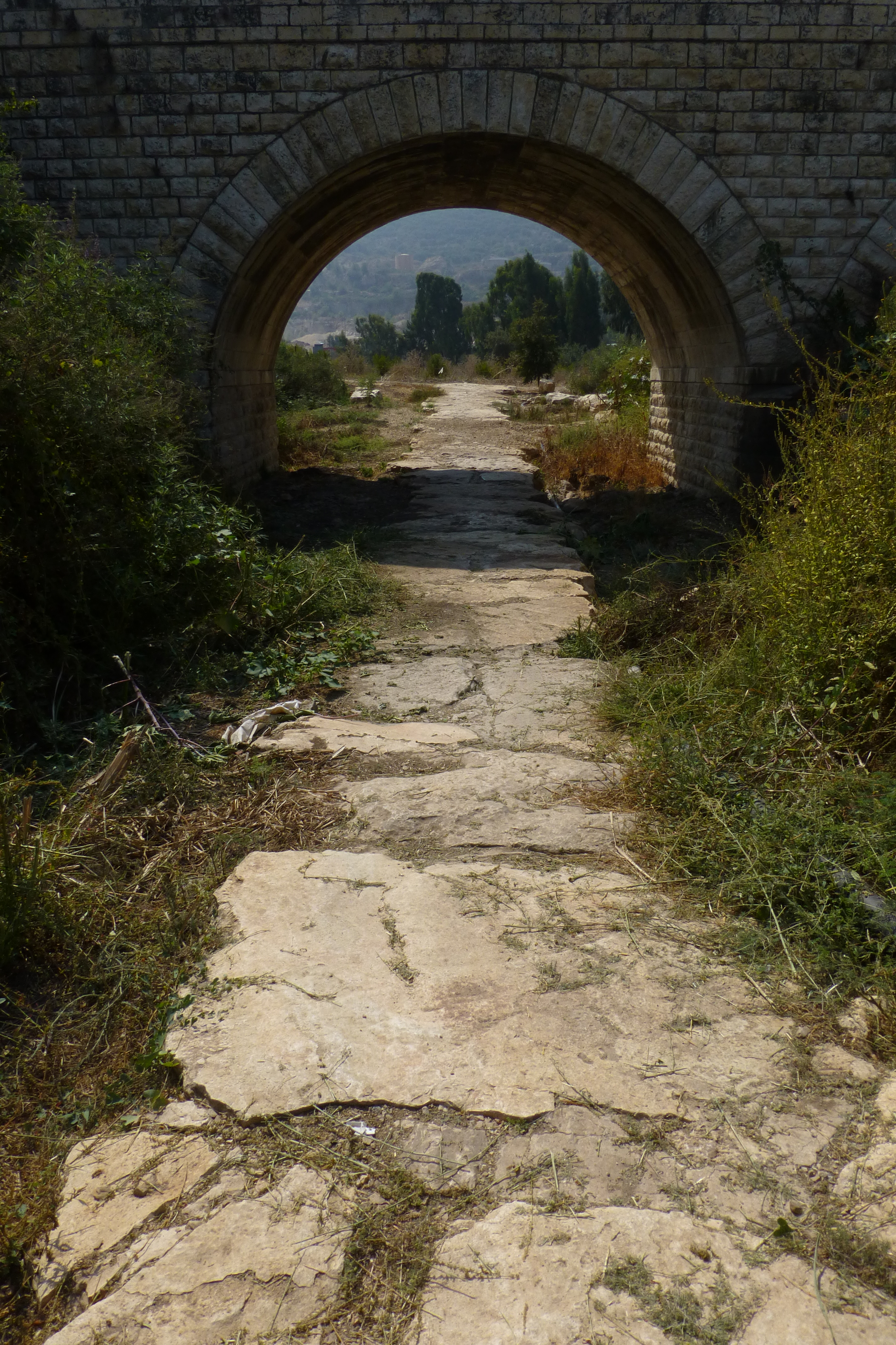 רכבת העמק - מעבירי מים והסוללה - צומת העמקים